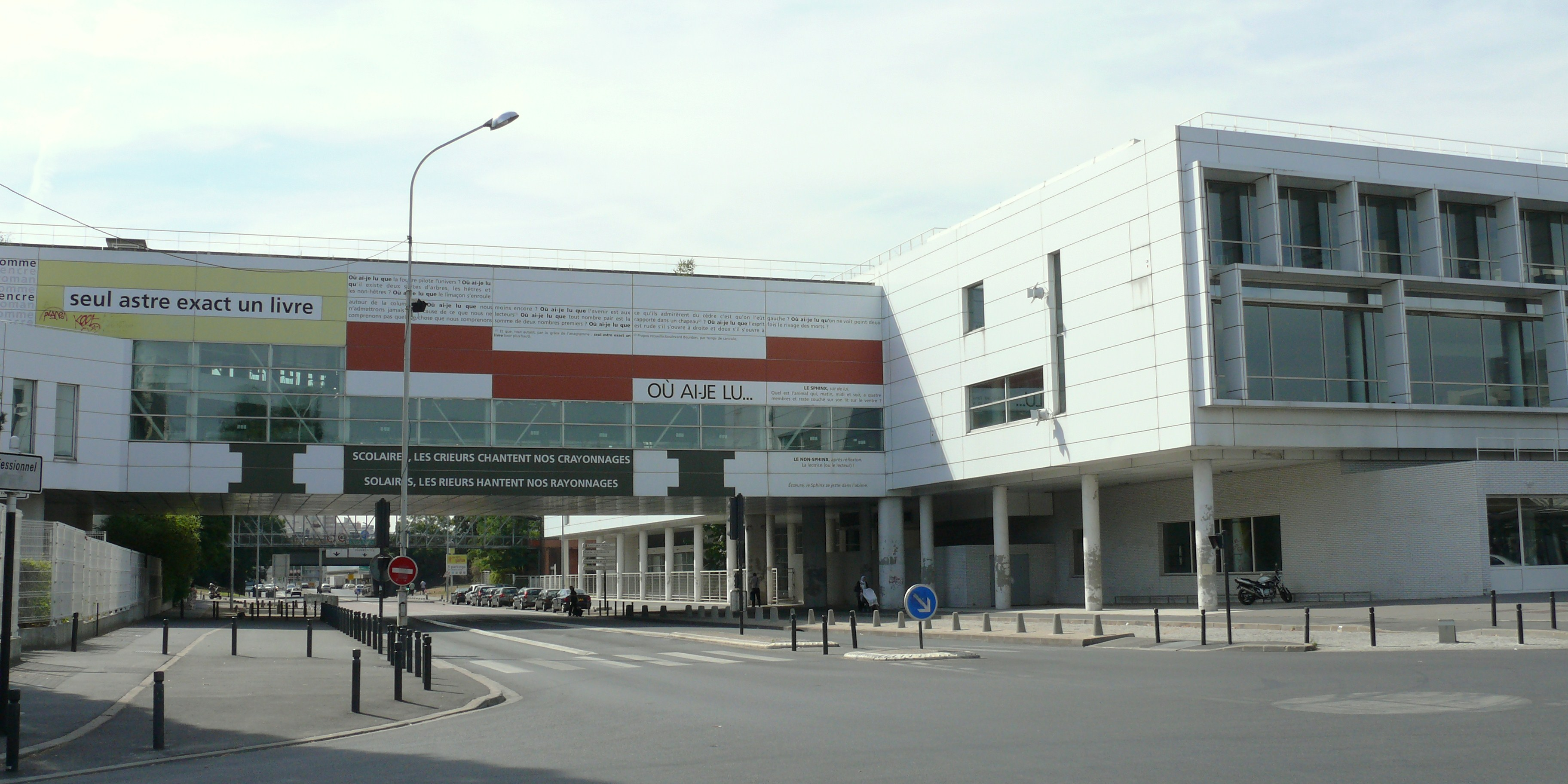 Saint-Denis - Bibliothèque de l'université Paris XIII